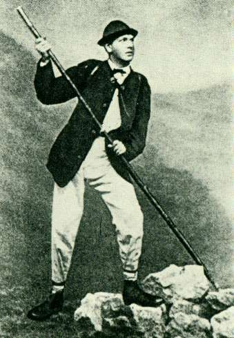 Der Bergsteiger Hermann von Barth (1845 - 1876) * Lizenz: gemeinfrei Siehe auch File:Hermann_von_Barth_Bergsteiger.jpg